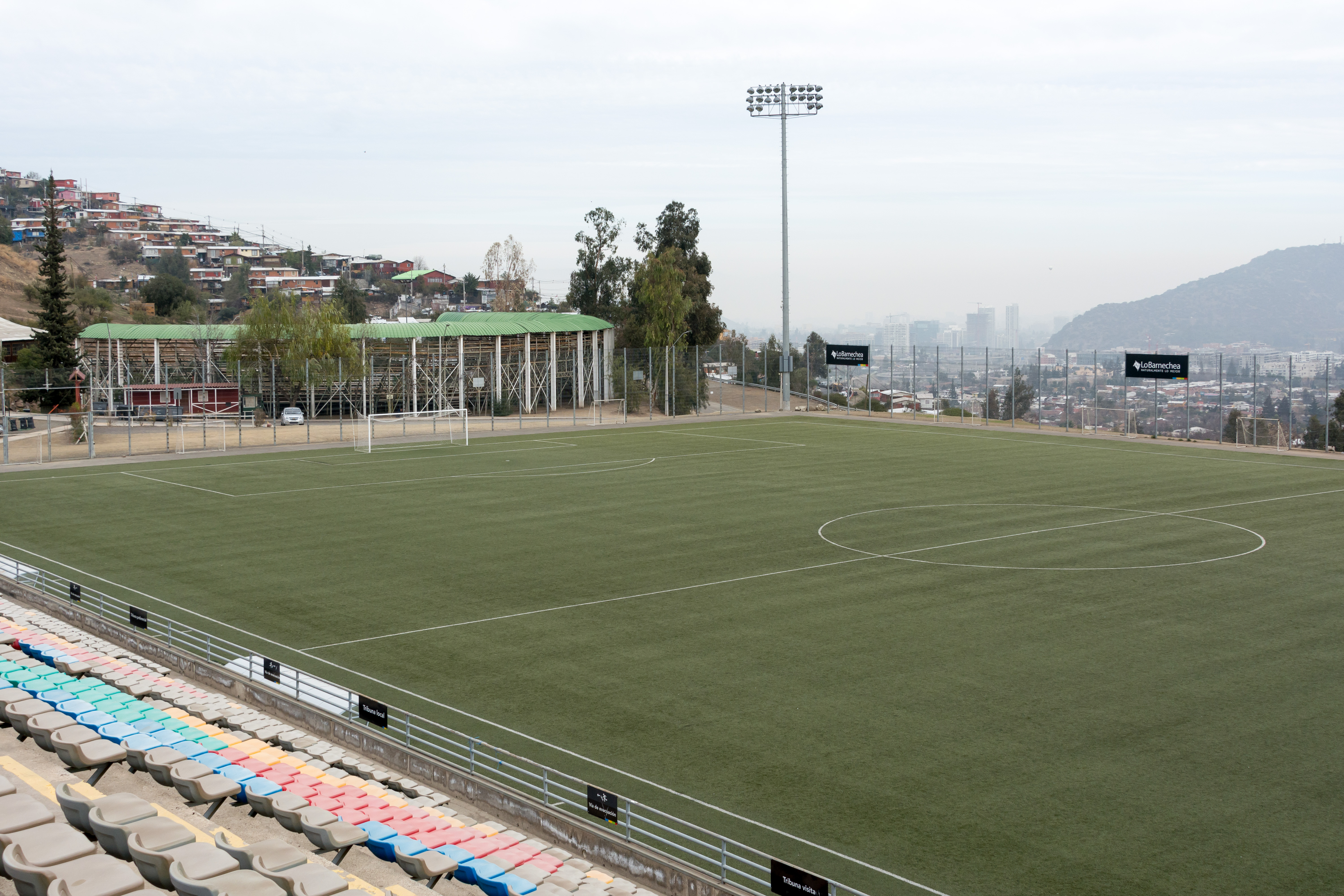 Estadio Municipal de Lo Barnechea, Lo Barnechea, Santiago, Región Metropolitana, Chile.